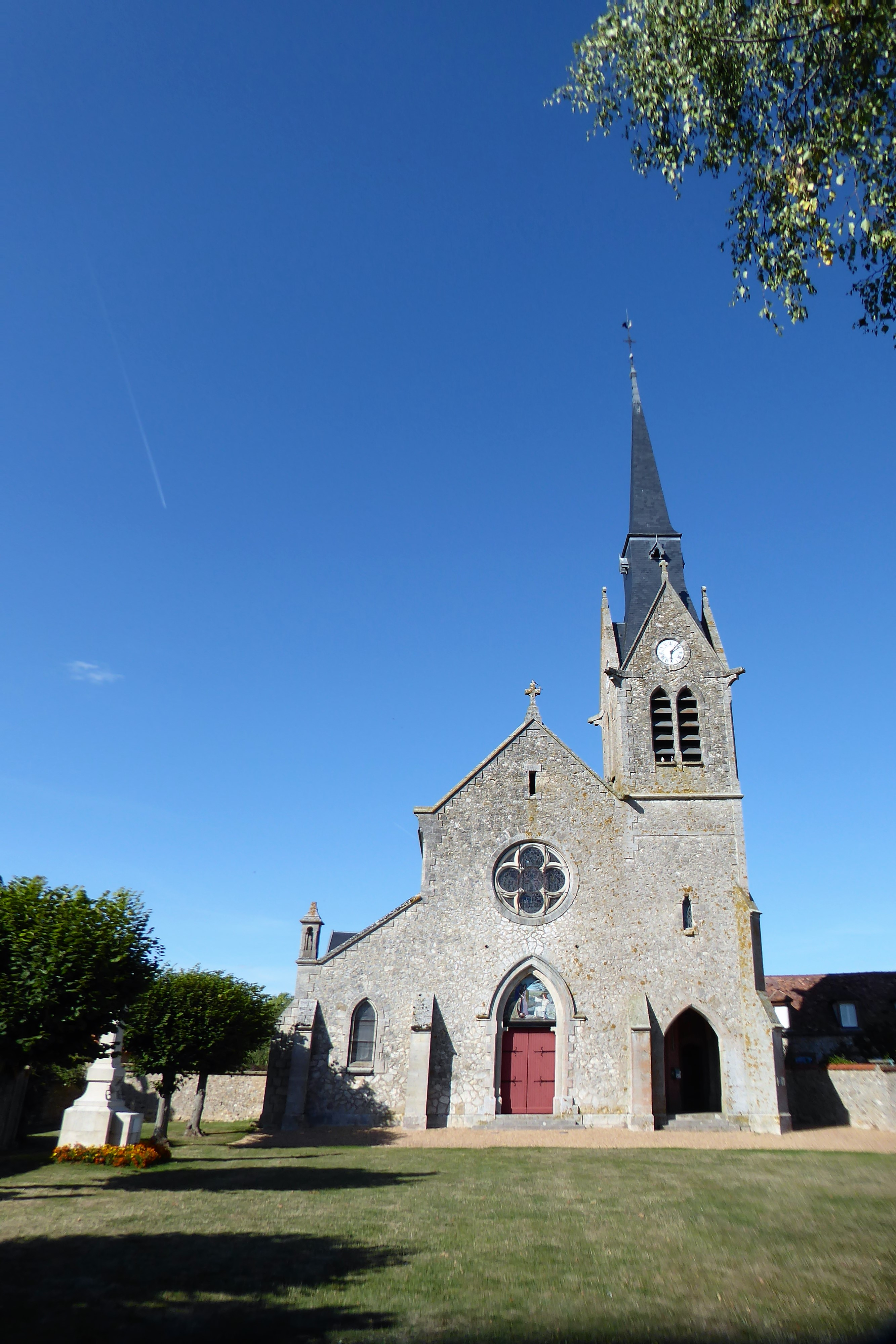 église Saint-Gervais-et-Saint-Protais, Mignières, Eure-et-Loir, France.